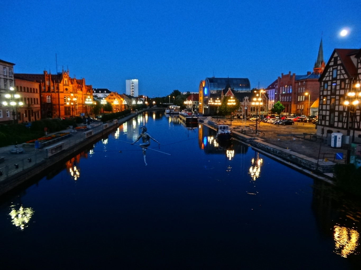 Widok z mostu Staromiejskiego im. Jerzego Sulimy-Kamińskiego w Bydgoszczy